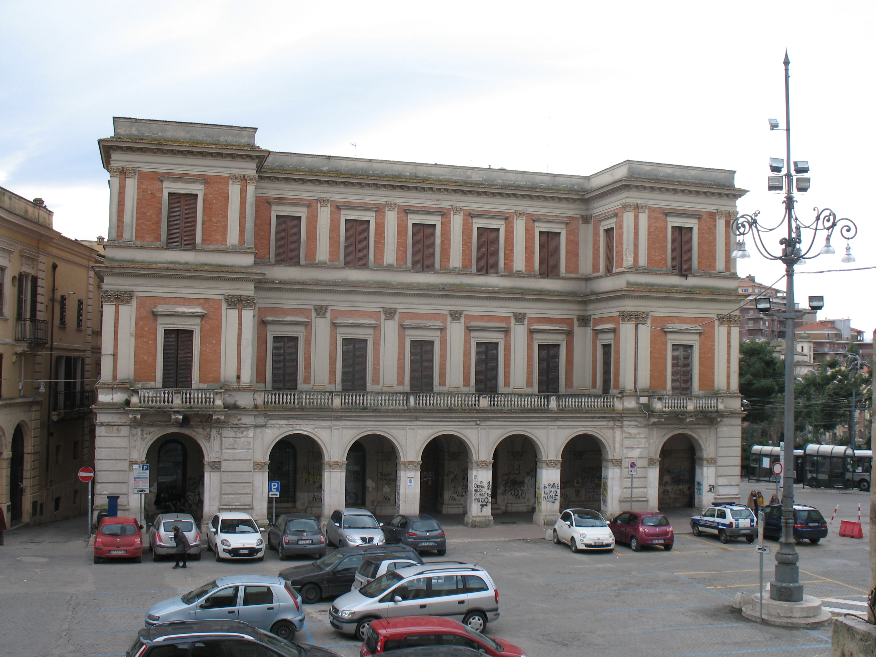 Il palazzo Mezzanotte, che si affaccia su piazza San Giustino, venne costruito alla fine del XIX secolo da Biase Mezzanotte, appartenente a una nota famiglia della borghesia teatina